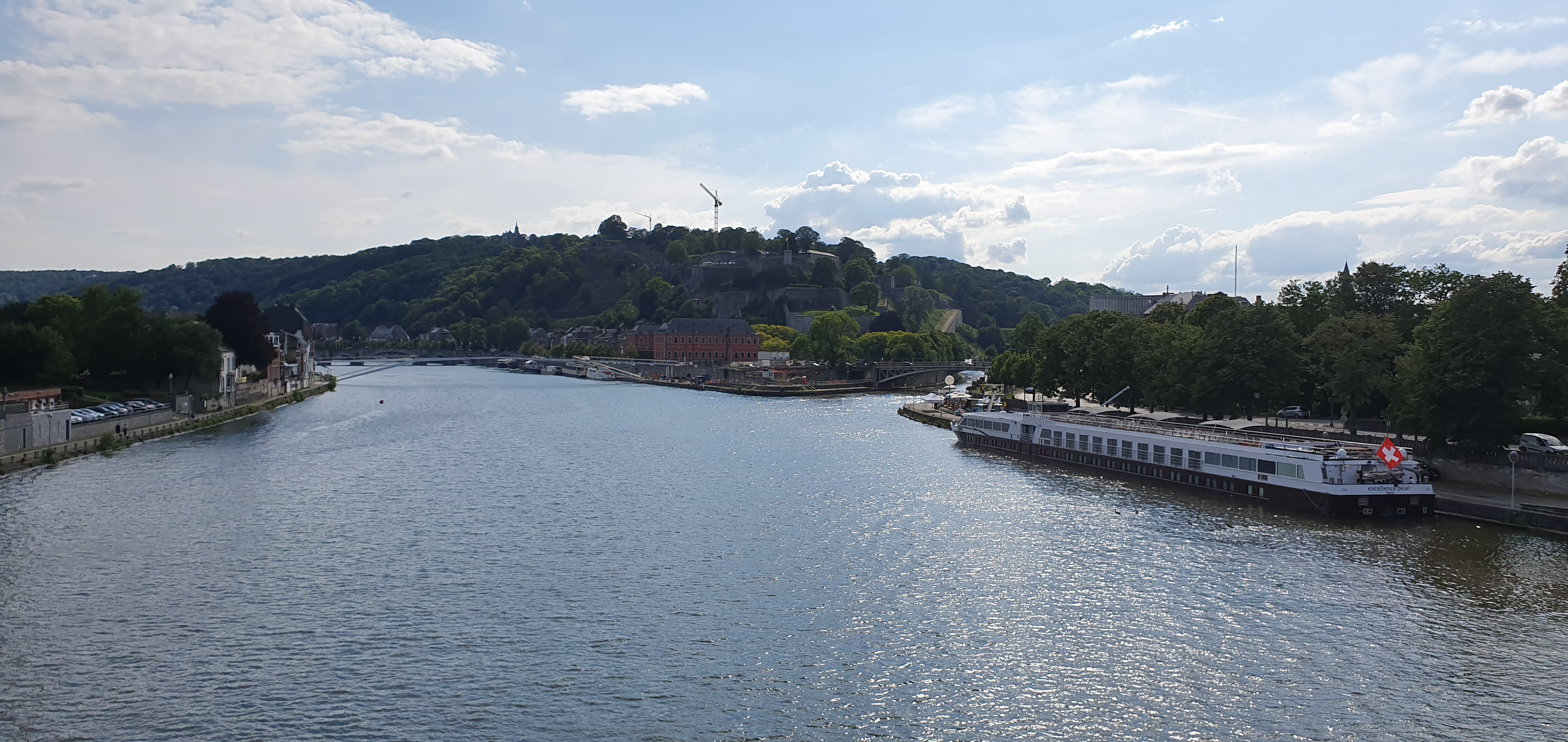 La pointe du grognon avec la Citadelle qui surplombe le confluent.